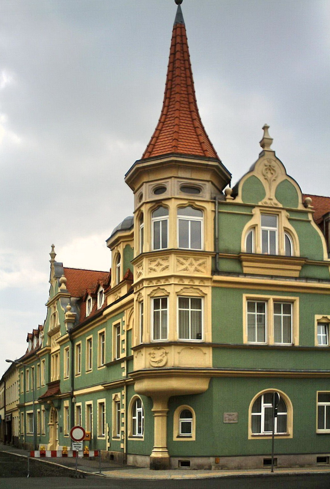 Rathaus Elsterwerda